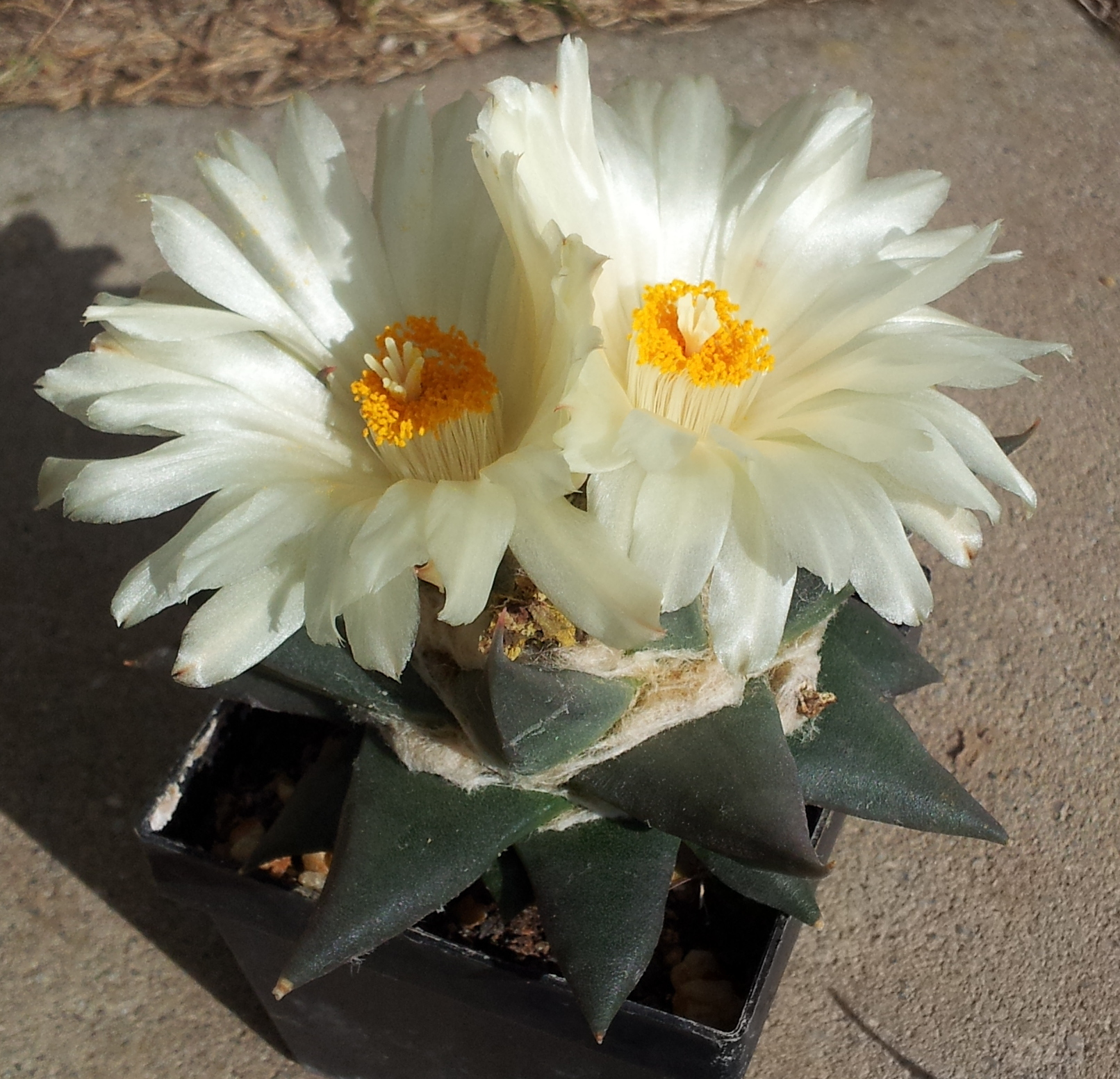 Ariocarpus trigonus in Blüte